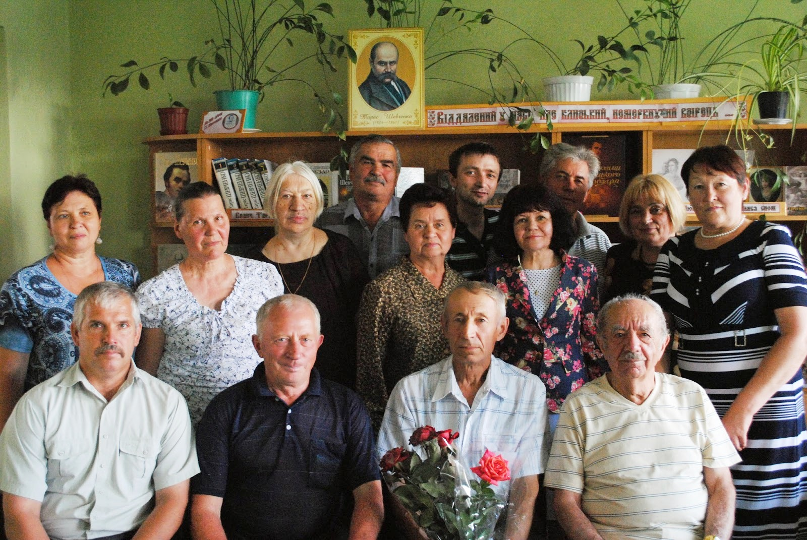 Олександр Корембліт на засіданні літературного салону "Бестселер" в центральній бібліотеці Куяльницької ЦБС Подільського району Одеської області